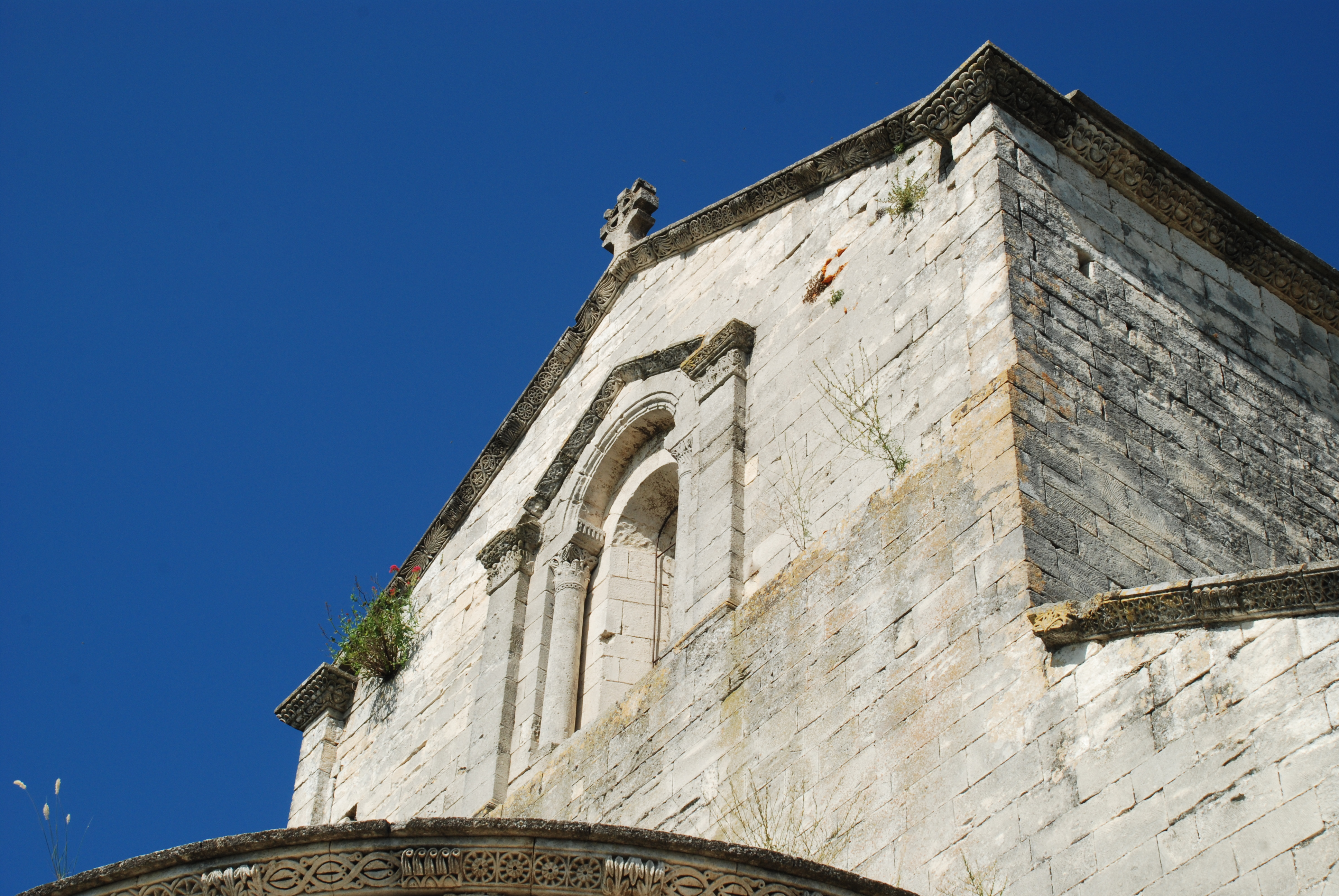 France - Drôme - La Garde-Adhémar